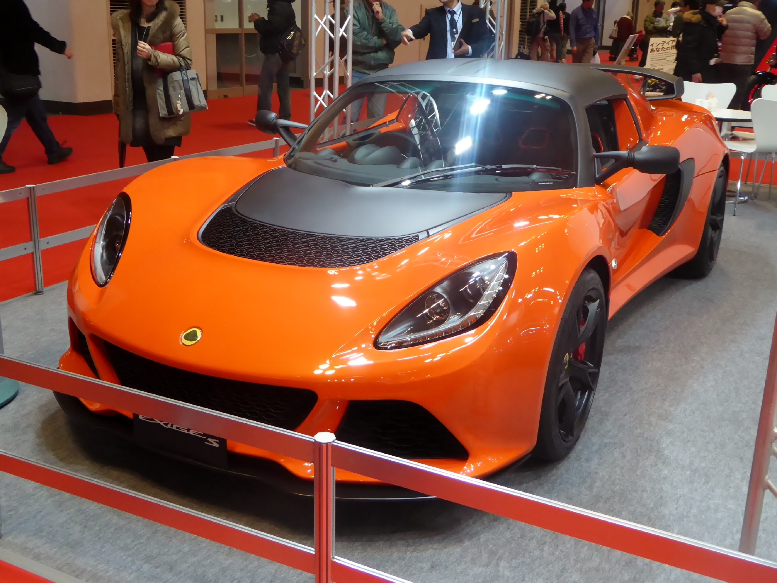 大阪モーターショー2015においてロータス・エキシージSクラブレーサーを撮影。